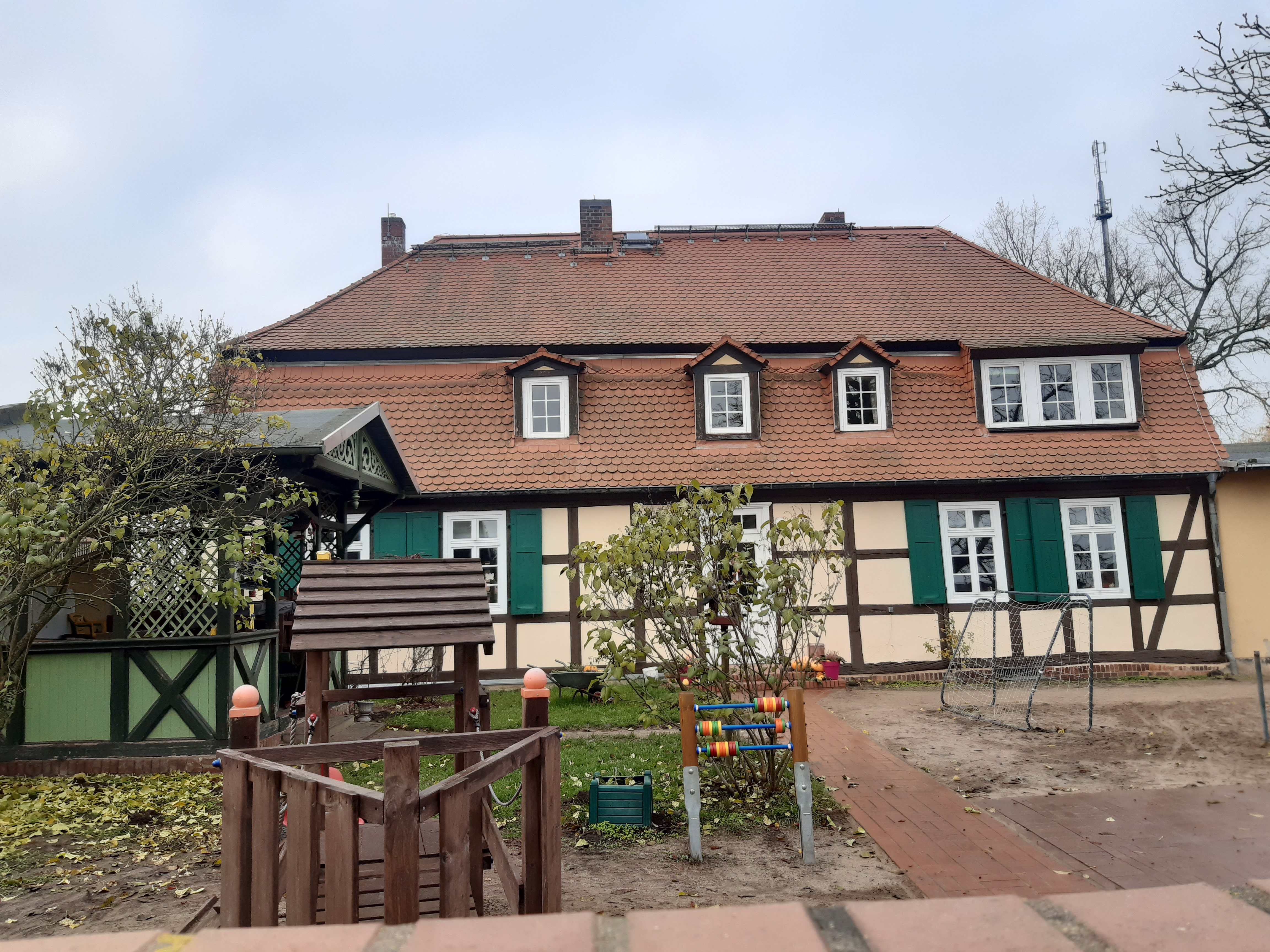 Pfarrhof